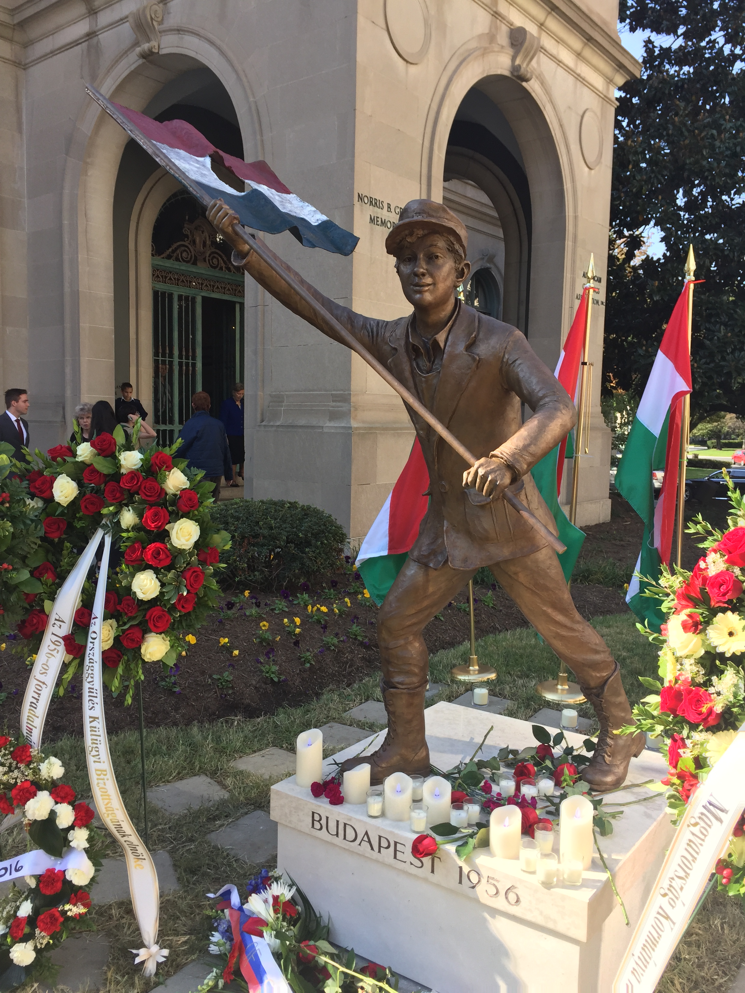 Pesti Srác szobra, Washington, Juha Richárd alkotása